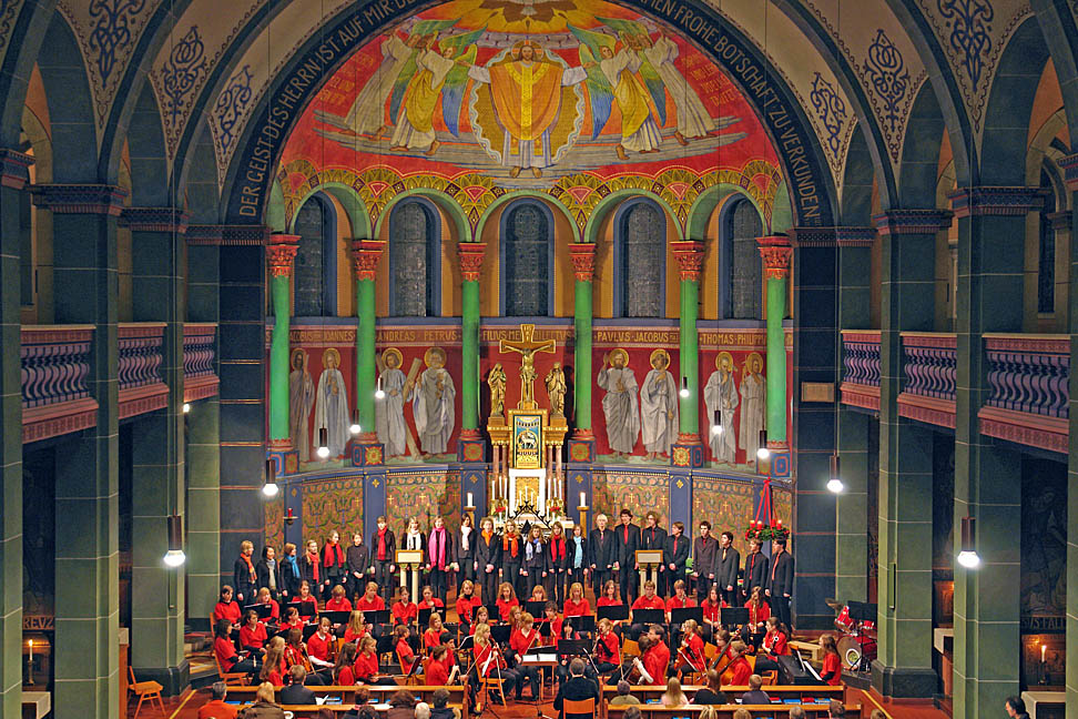 Gymnasium St. Xaver, Bad Driburg. Ausgemalt 1929-1930 von dem Münchner Kunstmaler Philipp Schumacher (1866-1940) im Nazarener Stil.